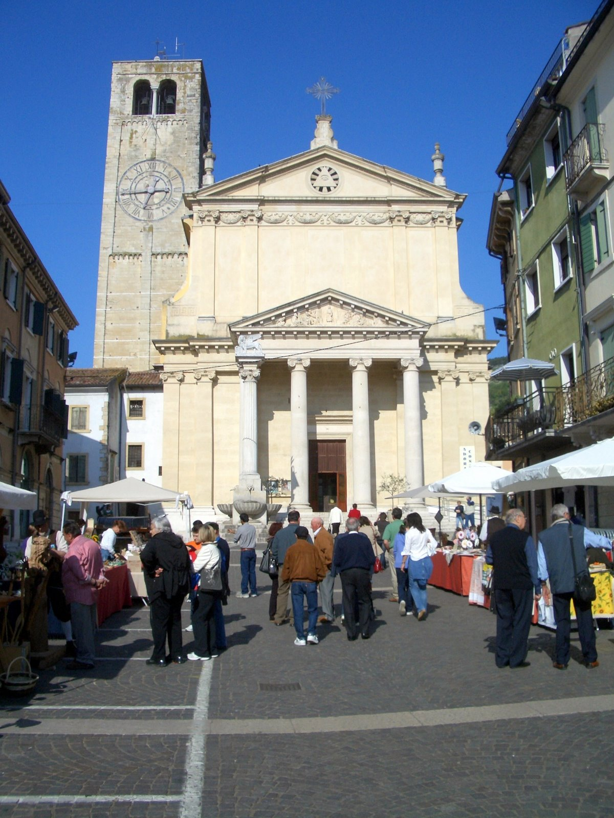 Foto della chiesa di Negrar presa dalla piazza antistante